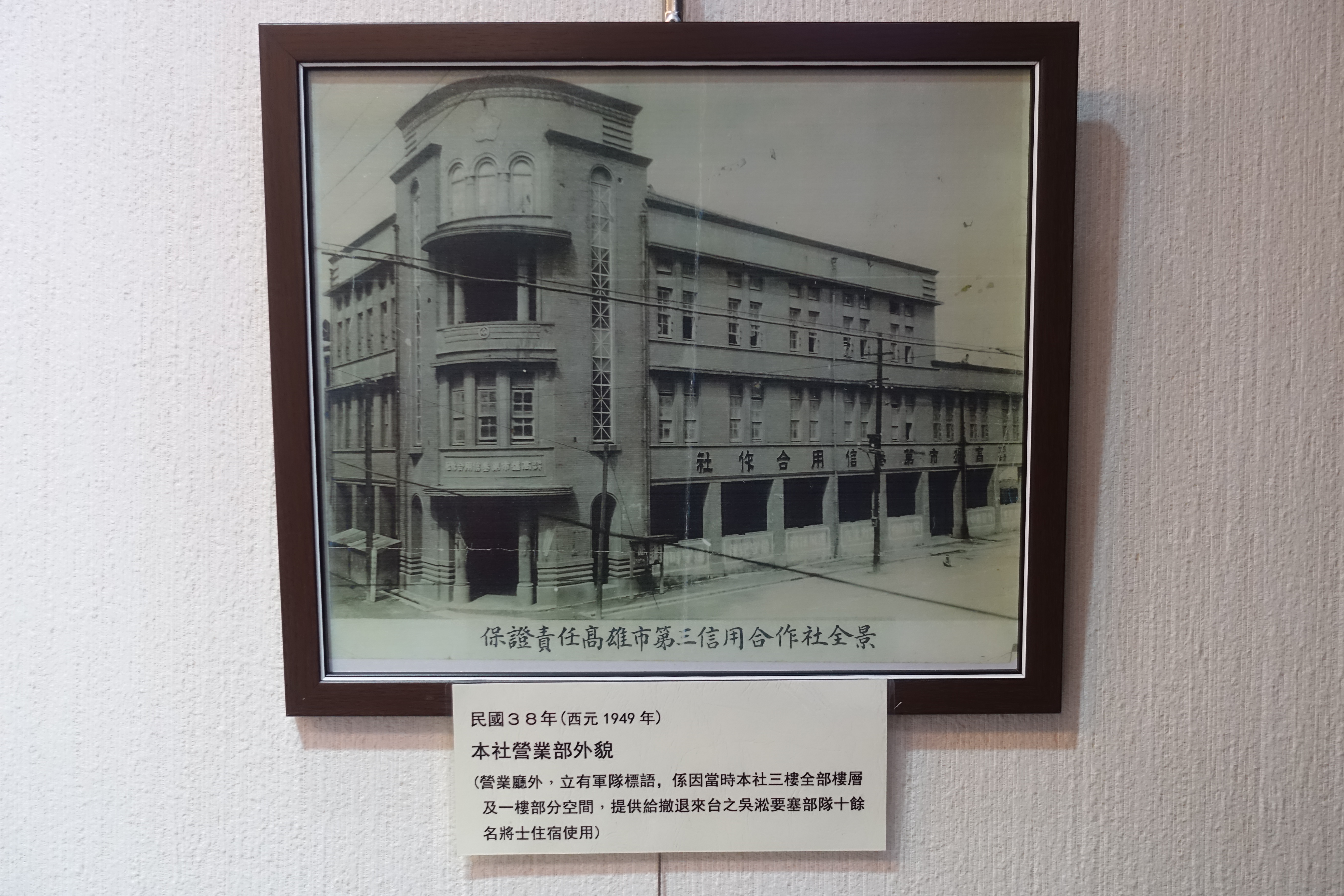 中文（台灣）: 興業信用組合事務所原貌，現為高雄市第三信用合作社，翻攝自高雄三信歷史文物館